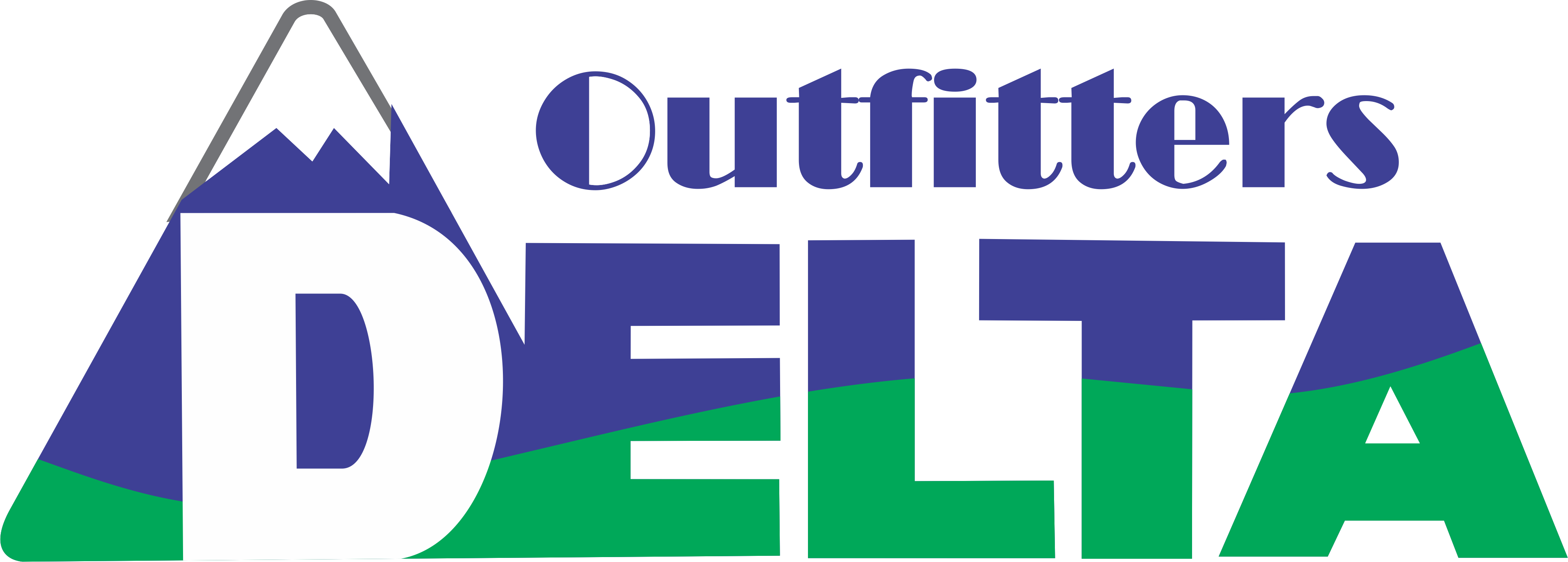 Монгол: logo